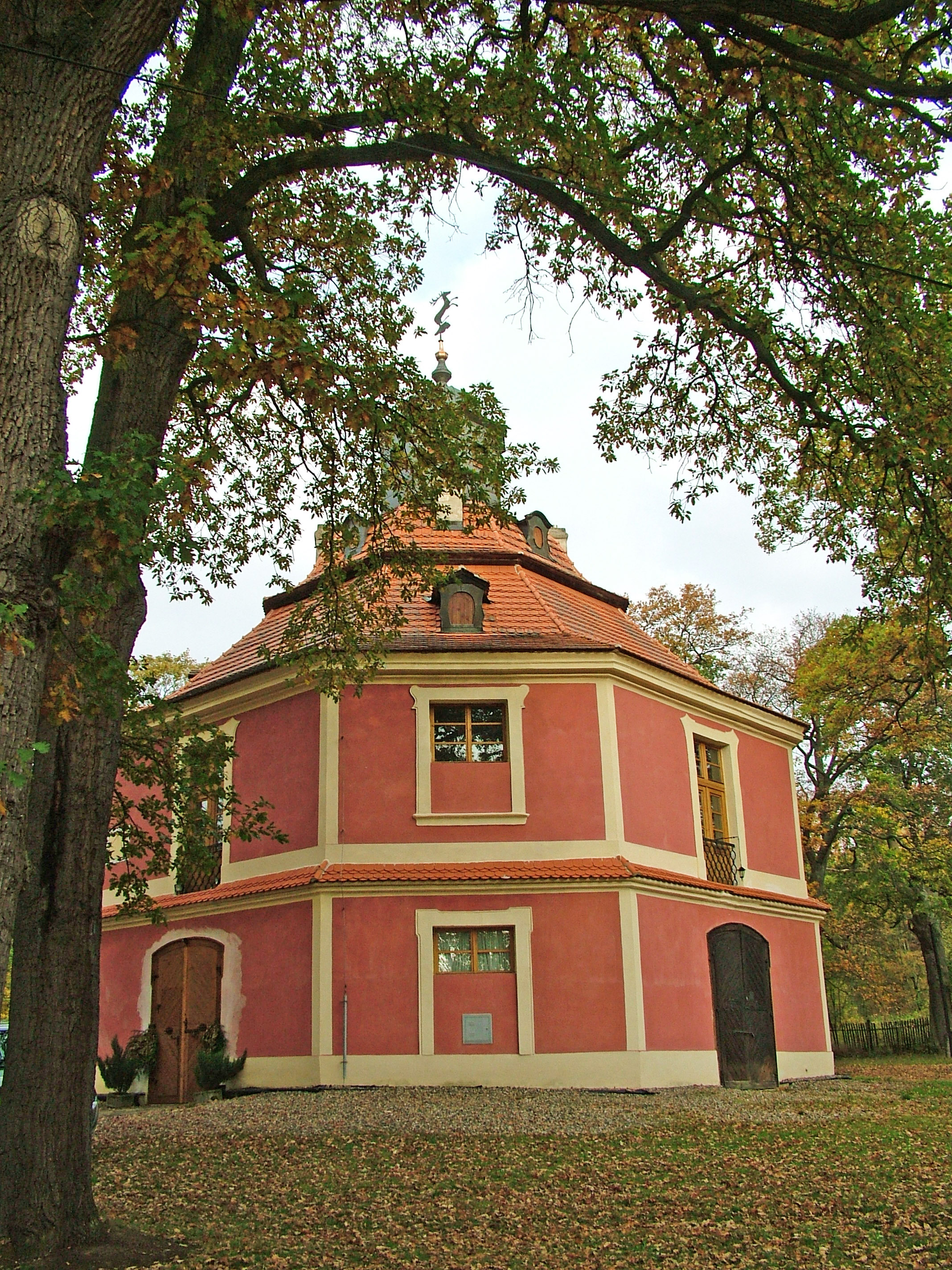 Zámeček Svatý Hubert, Jesenice u Rakovníka